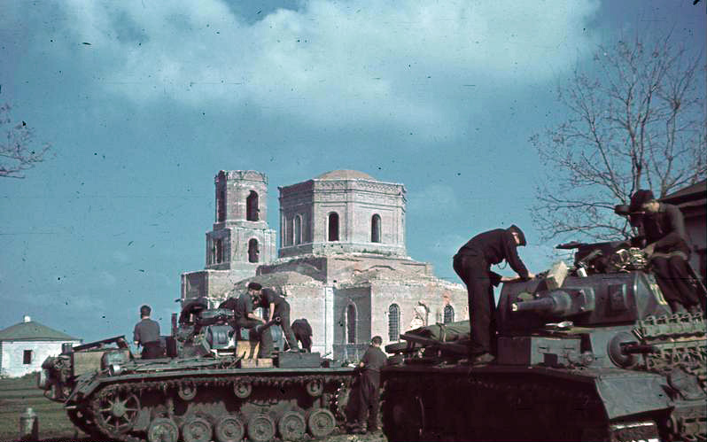 Deutsche Panzer werden überholt und Vorräte aufgefüllt Poltawa Herbst 1942